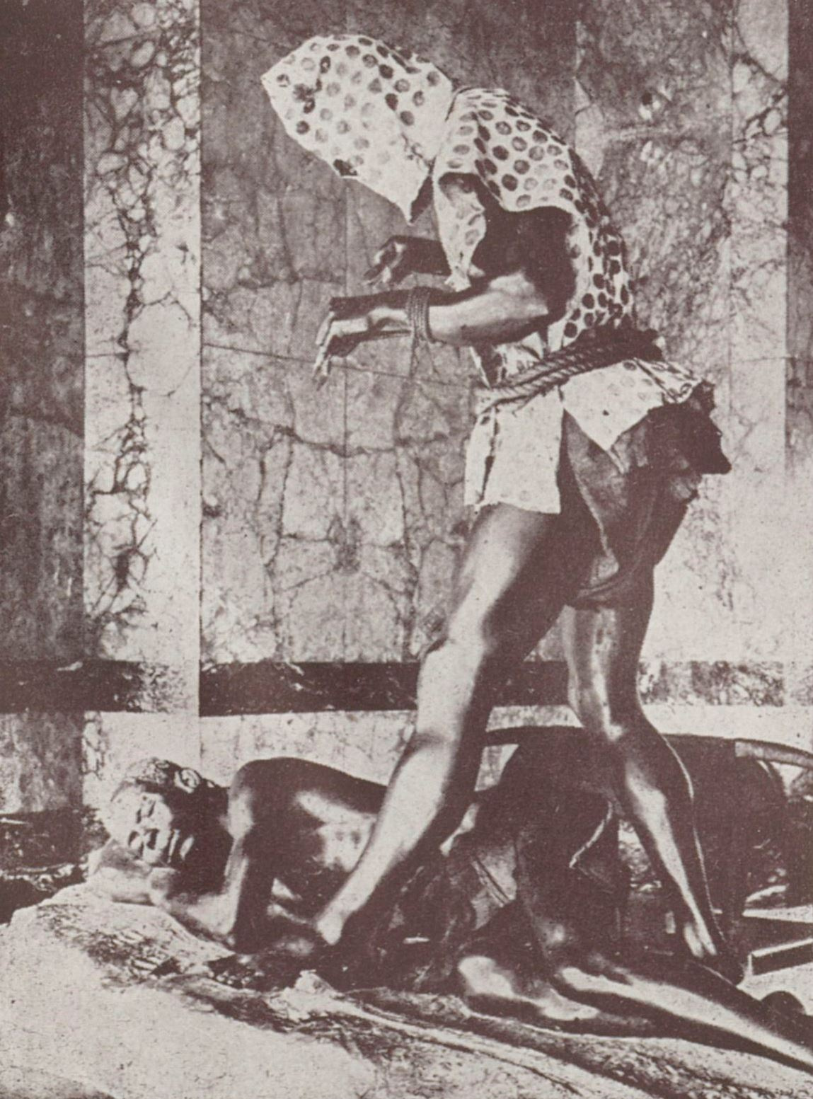 "L'équipement d'un homme-léopard reconstitué au musée de Tervueren à Bruxelles" [Mobali-Anioto].